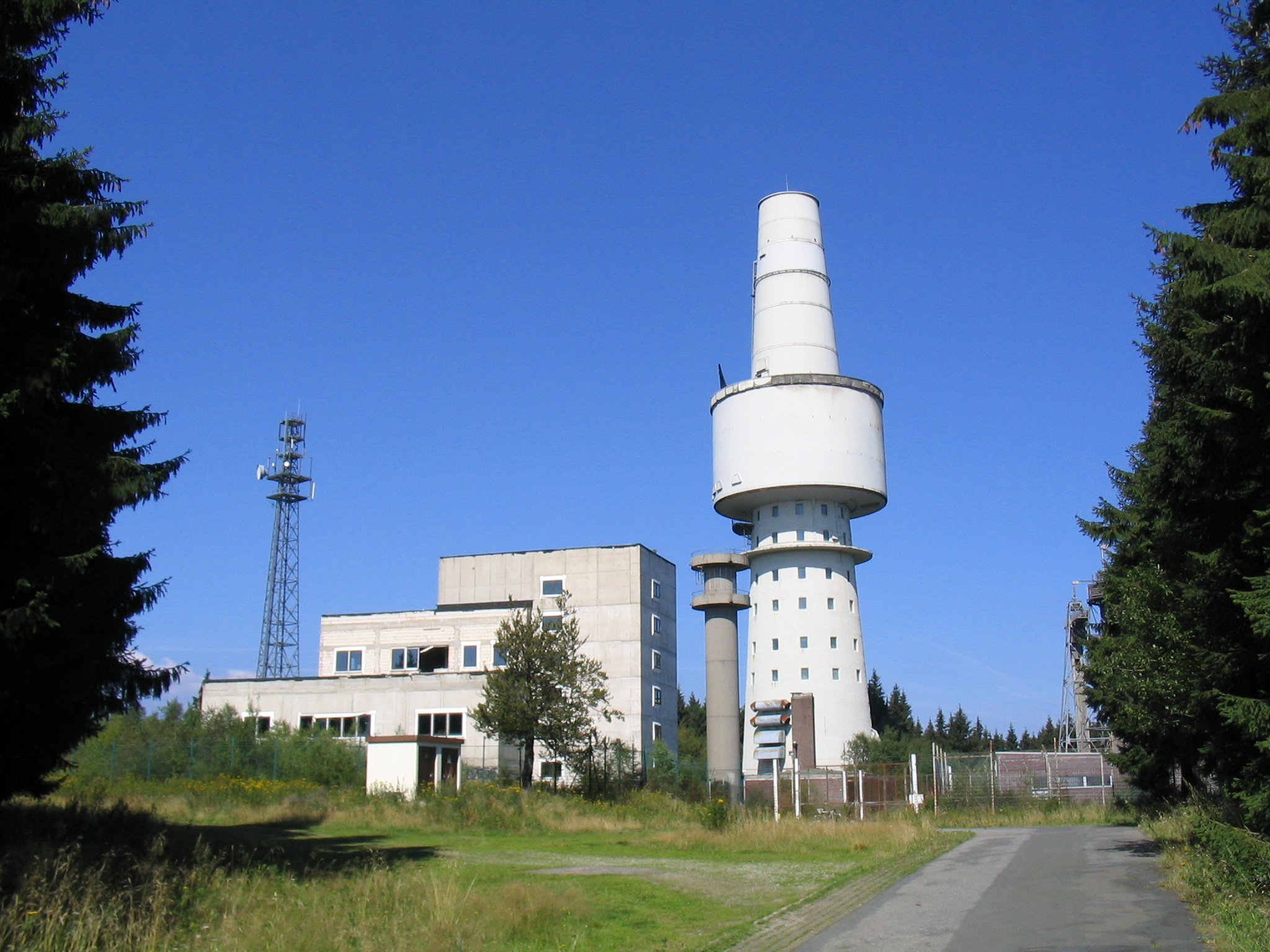 Ehemaliger Horchposten auf dem Stöberhai bei Wieda im Harz